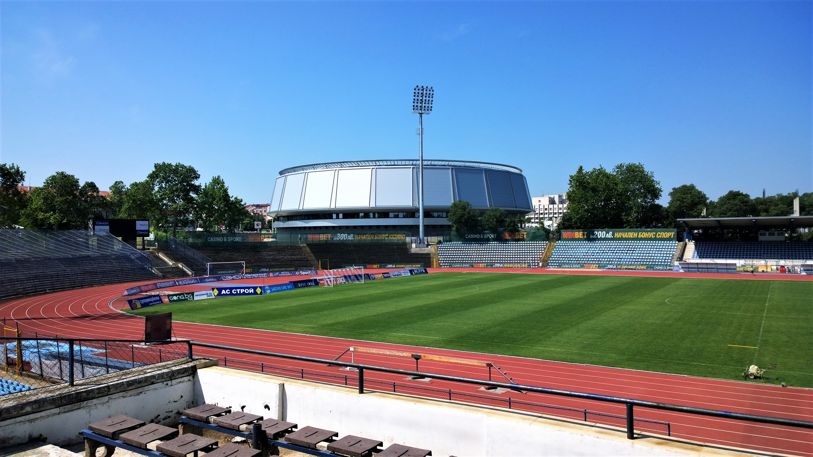 Градски стадион в Русе